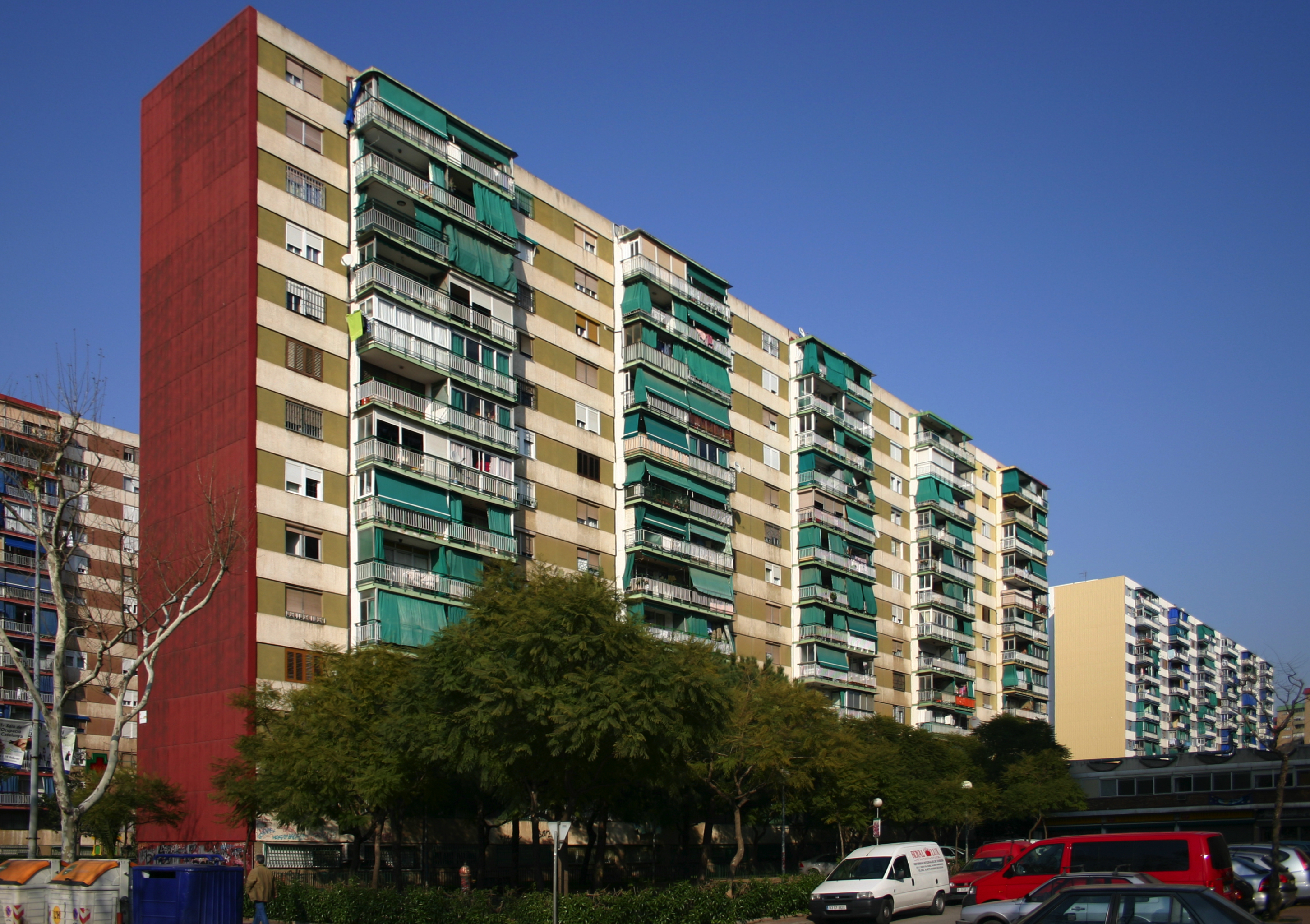 Barrio Bellvitge.